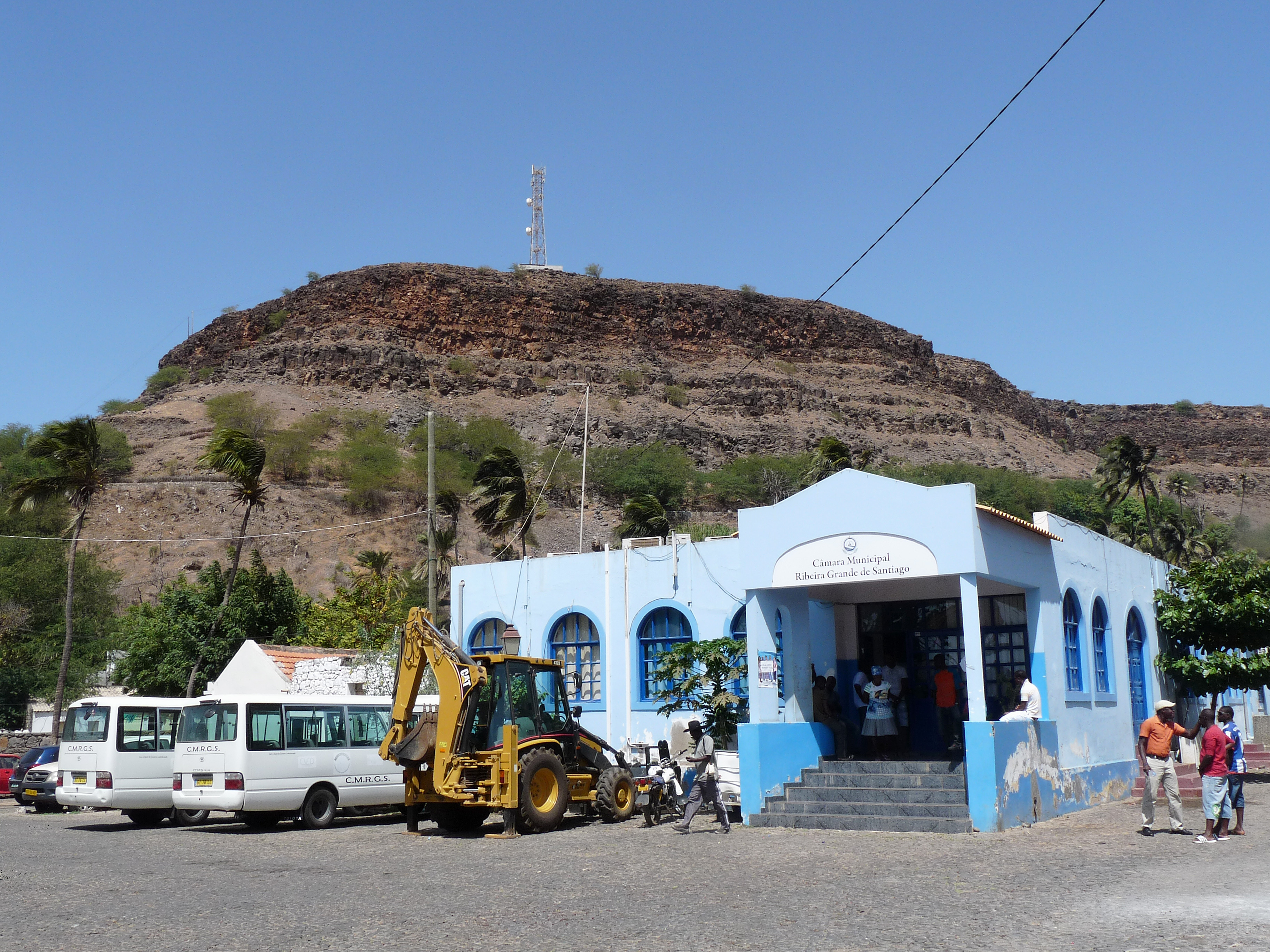 Cidade Velha (île de Santiago, Cap-Vert) : Câmara Municipal de Ribeira Grande de Santiago